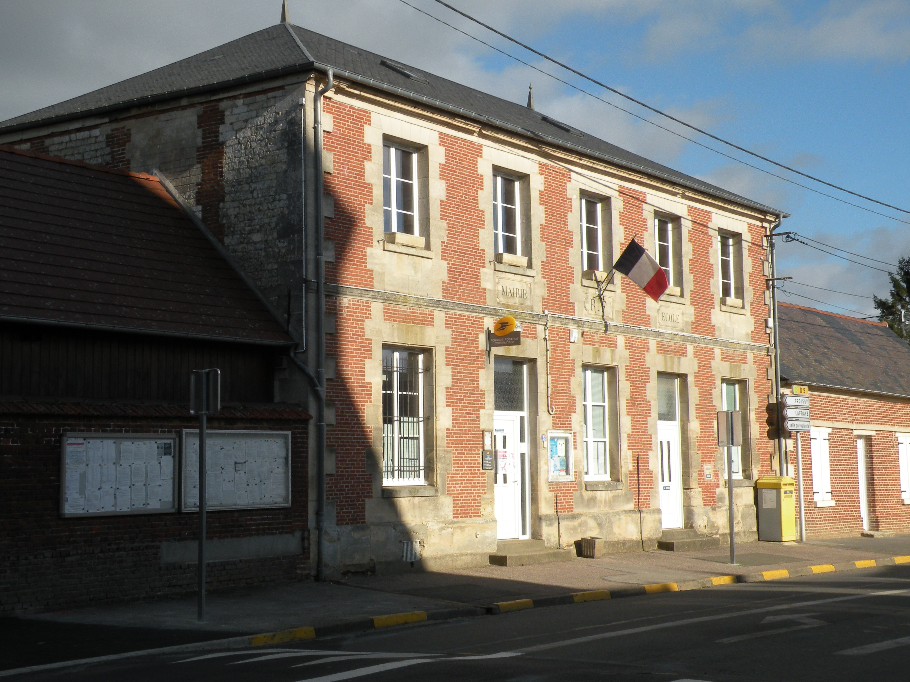 Haudivillers